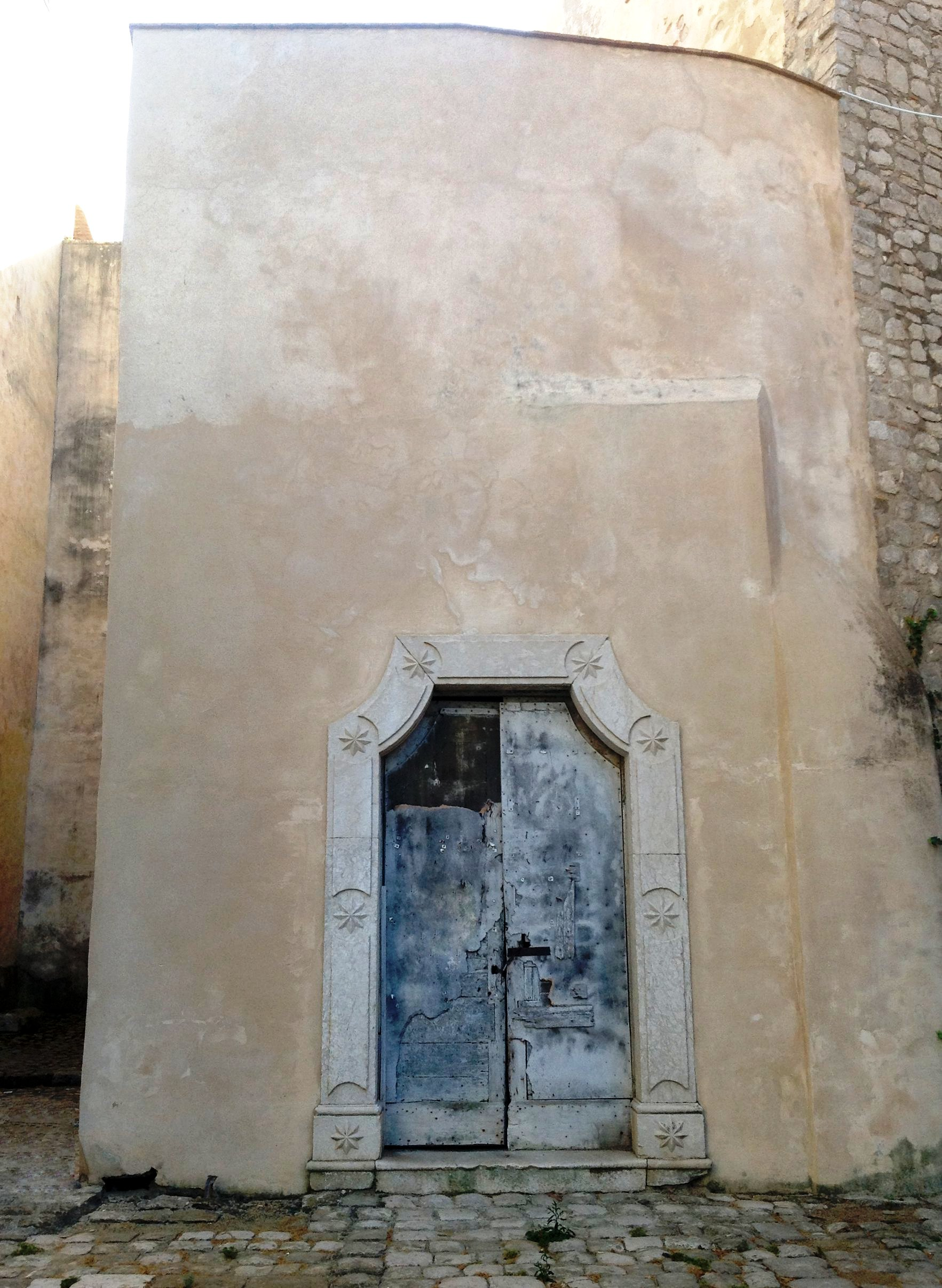 Il portale dell'ex convento di San Domenico a Gaeta, annesso all'omonima chiesa.